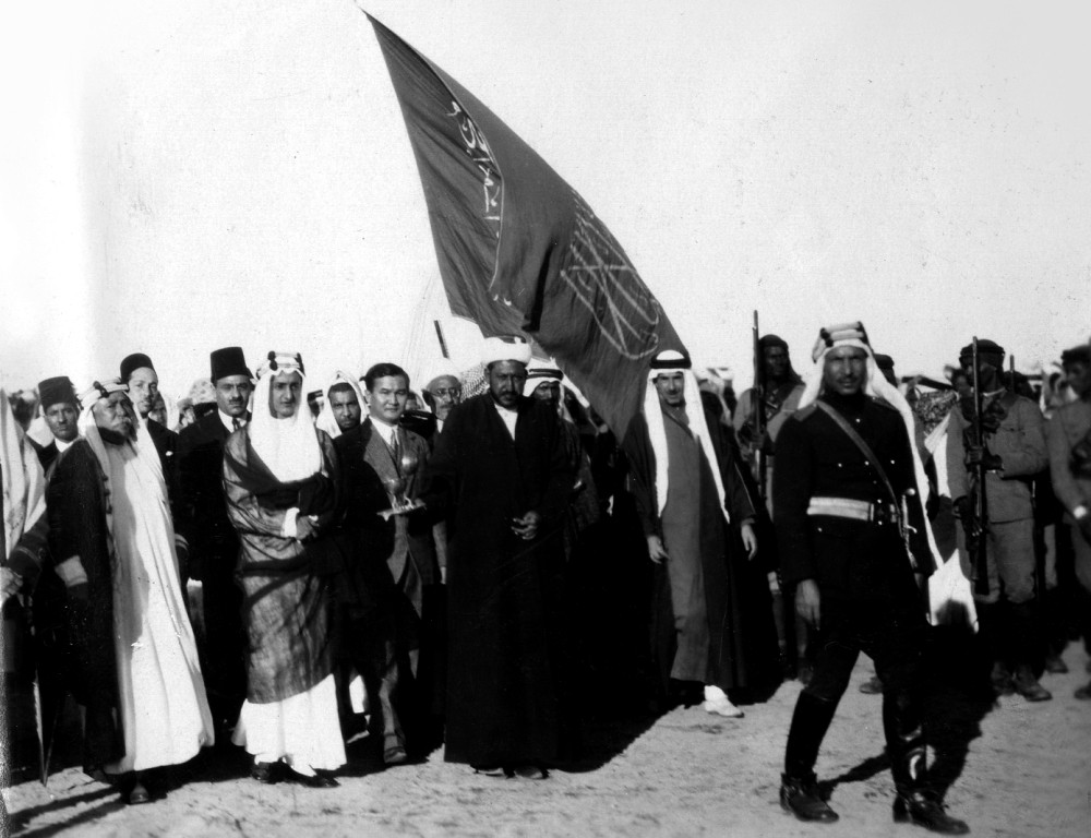 с дипломатами...